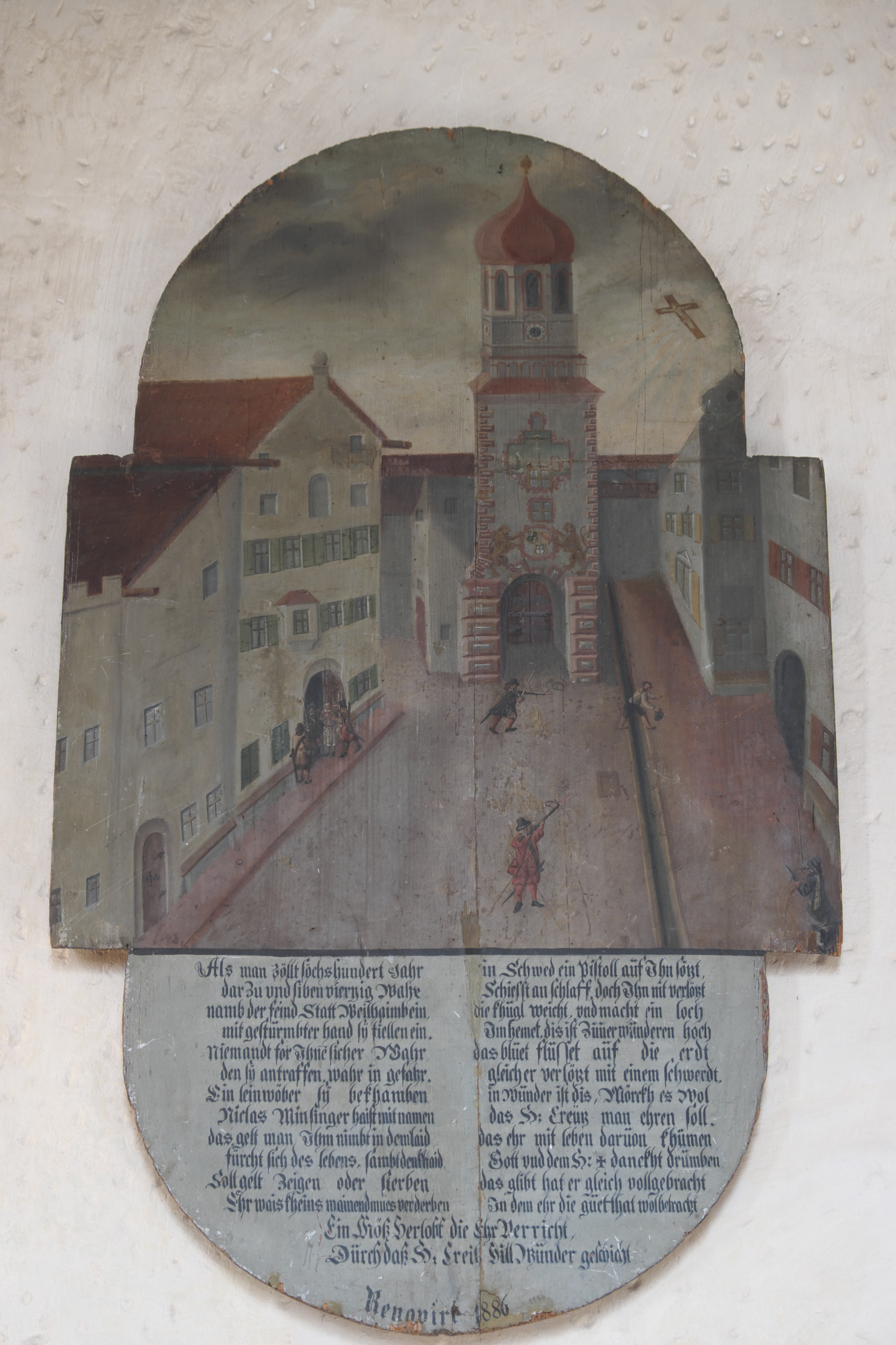 Katholische Friedhofskirche St. Salvator und Sebastian in Weilheim in Oberbayern im Landkreis Weilheim-Schongau (Bayern/Deutschland), Votivbild im Chor